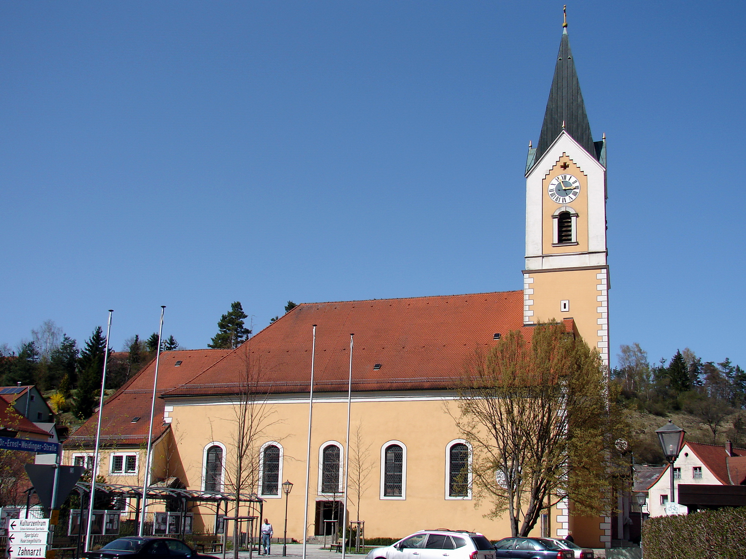 Die katholische Pfarrkirche St. Ulrich in der bayerischen Marktgemeinde Hohenfels ist eine barocke Kirche, die in der heutigen Form zwischen 1716 und 1721 erbaut und dem heiligen Ulrich von Augsburg geweiht wurde. Sie gehört zum Dekanat Laaber im Bistum Regensburg.